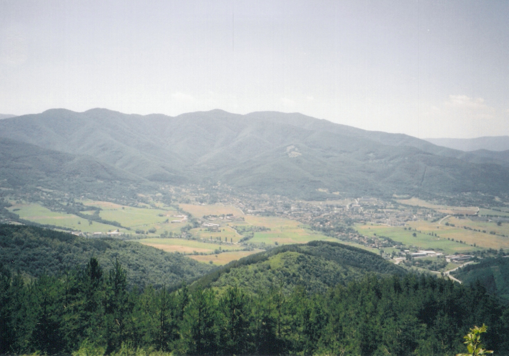 Било планина и Правец